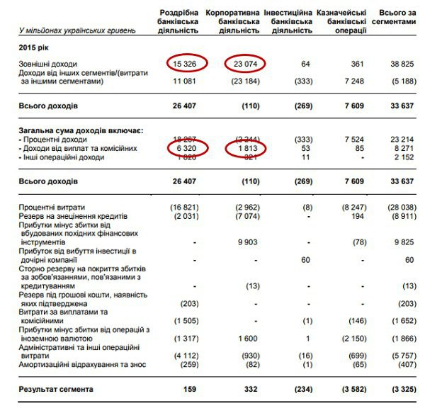 Діяльність "ПриватБанку" за сегментами за фінансовою звітністю 2015р.